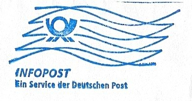 Logografie "Infopost" (Deutsche Post AG)